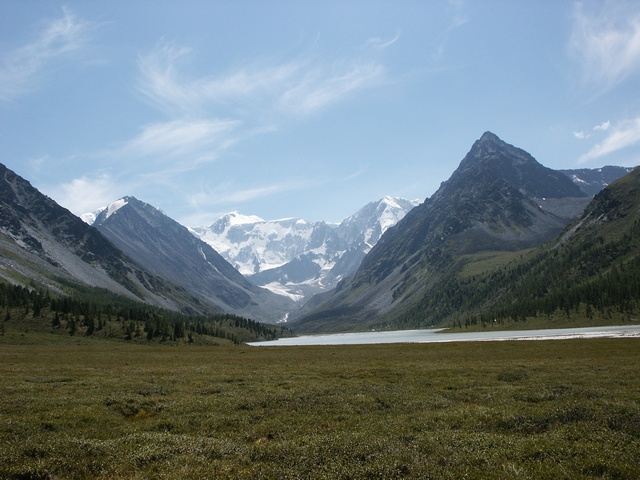 Вид на оз. Аккем